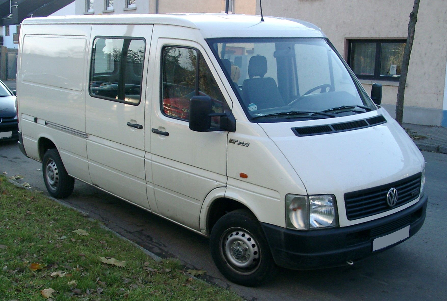 VW LT 28, 2. Generation